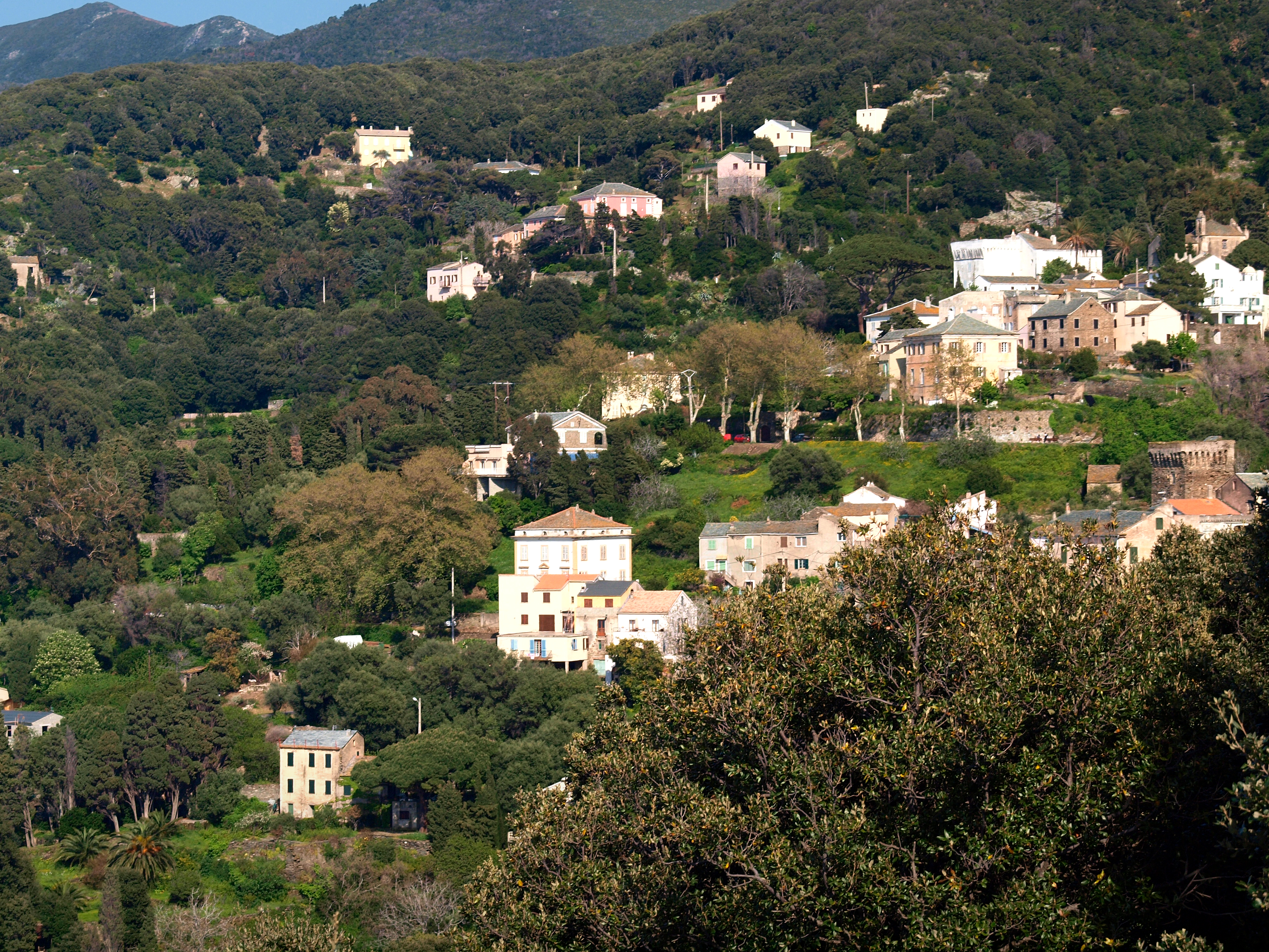 Pino, Cap Corse (Haute-Corse) - Hameaux de Casuccio et de Cicocce